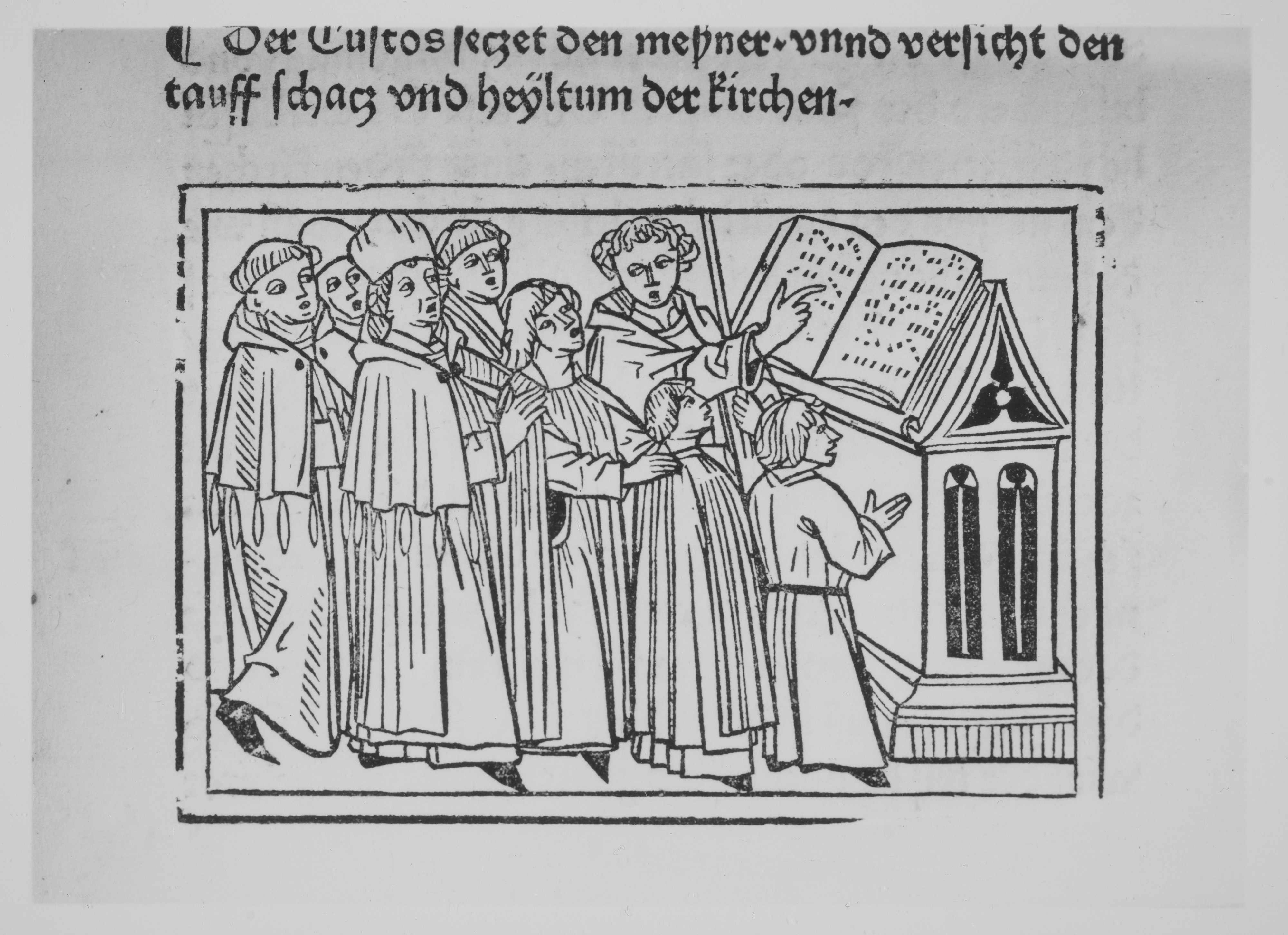 Book; Books